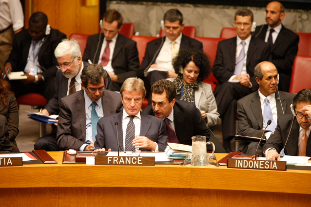 Bernard Kouchner et Eric Chevallier